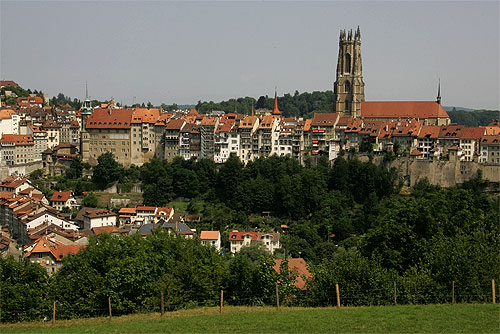 Fribourg / Freiburg: Ansicht von Süden her